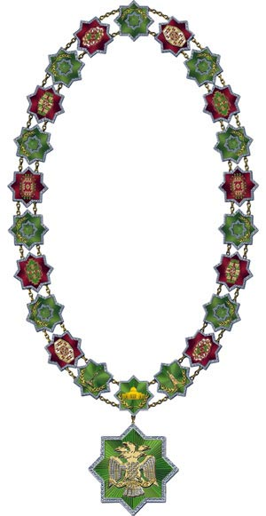 Знак туркменского ордена Отечества